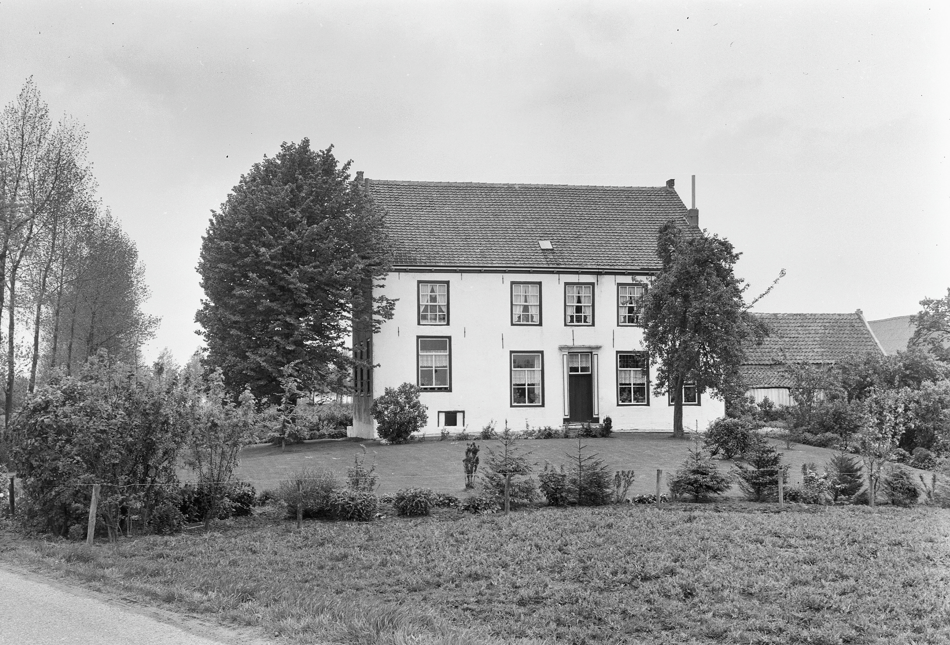 Diversen: Huis Lettenburg, voorgevel